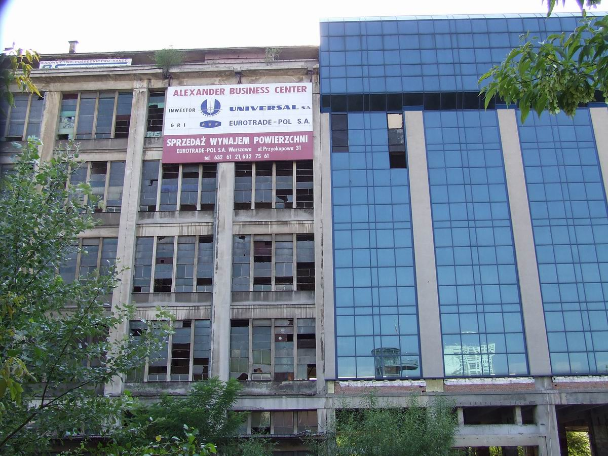 Zakłady Wytwórcze Lamp Elektrycznych i Rtęciowych im. Róży Luksemburg, a.d. 2006